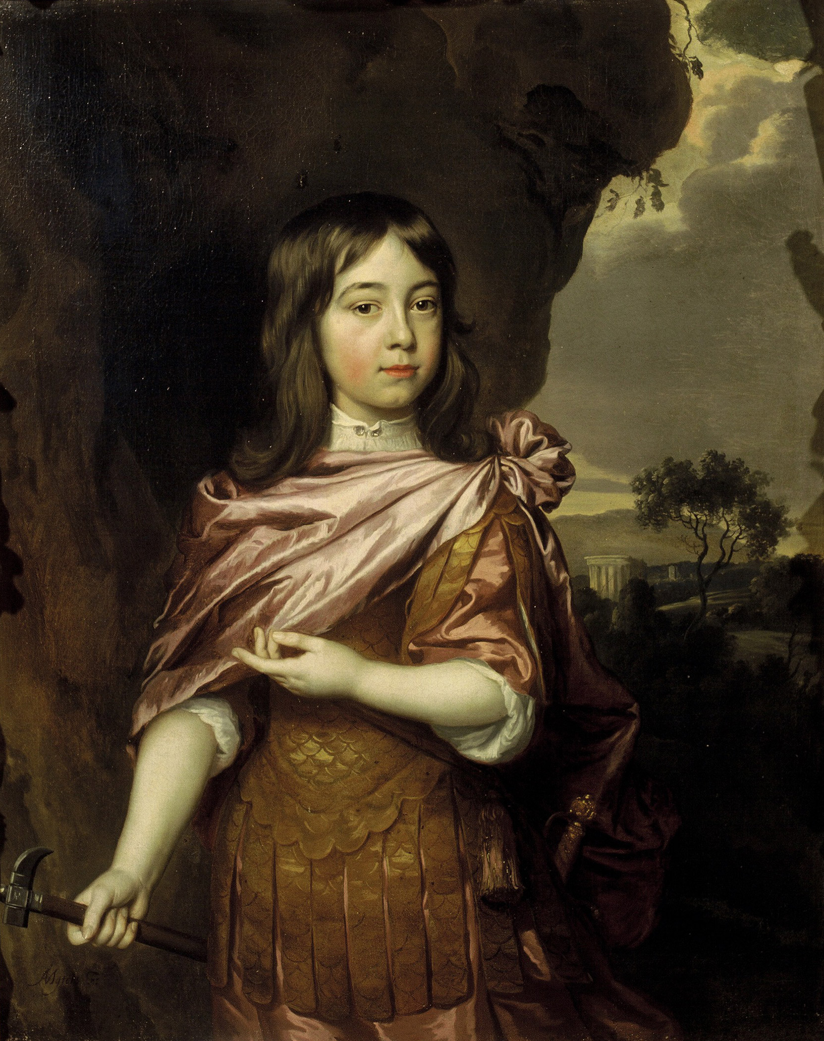 Portret van Wolfert van Brederode